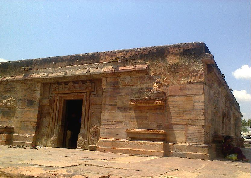 అర్కబ్రహ్మేశ్వరస్వామి దేవాలయం